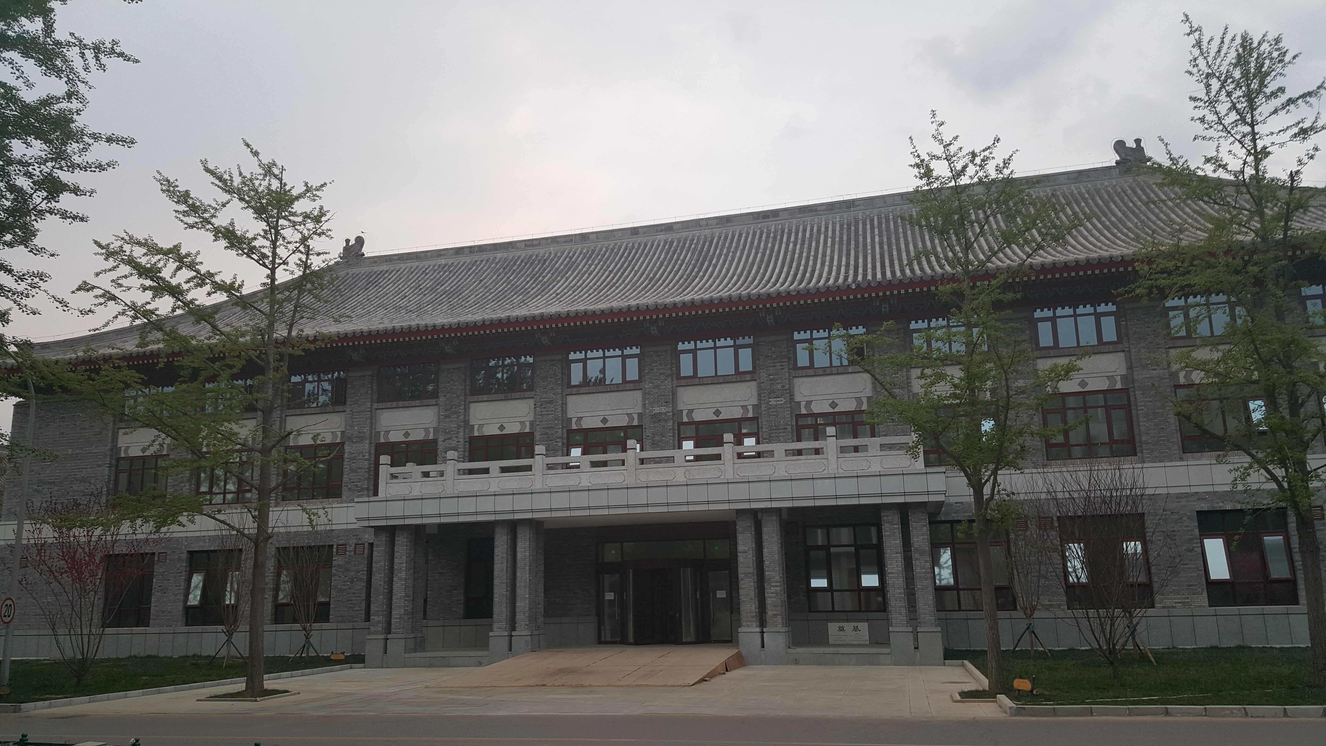 中文（中国大陆）: 阿卜杜勒·阿齐兹国王公共图书馆北京大学分馆